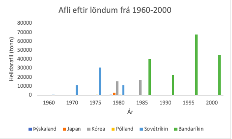 Afli Atka makríls eftir löndum á 5 ára fresti frá 1960-2000